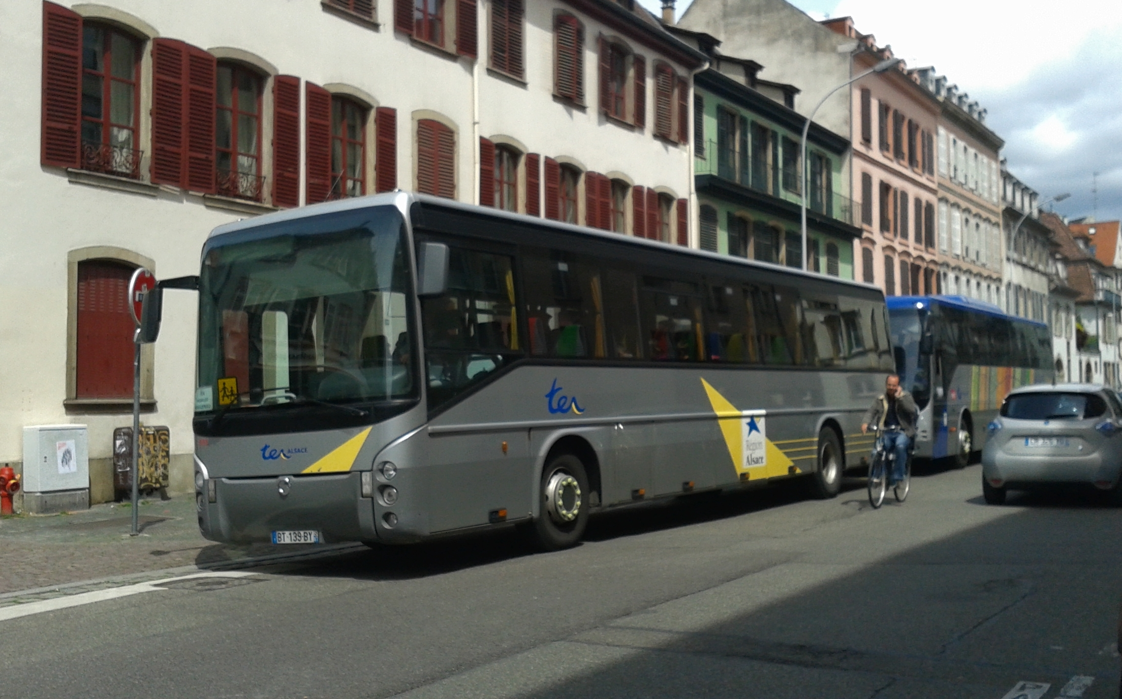 Irisbus Ares du TER Alsace (ancienne sérigraphie), sur un service scolaire.